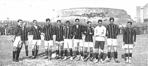 Fotografía del equipo de fútbol del Racing Club de Madrid publicada en 1915 tras su victoria en la final del campeonato de la Región Centro